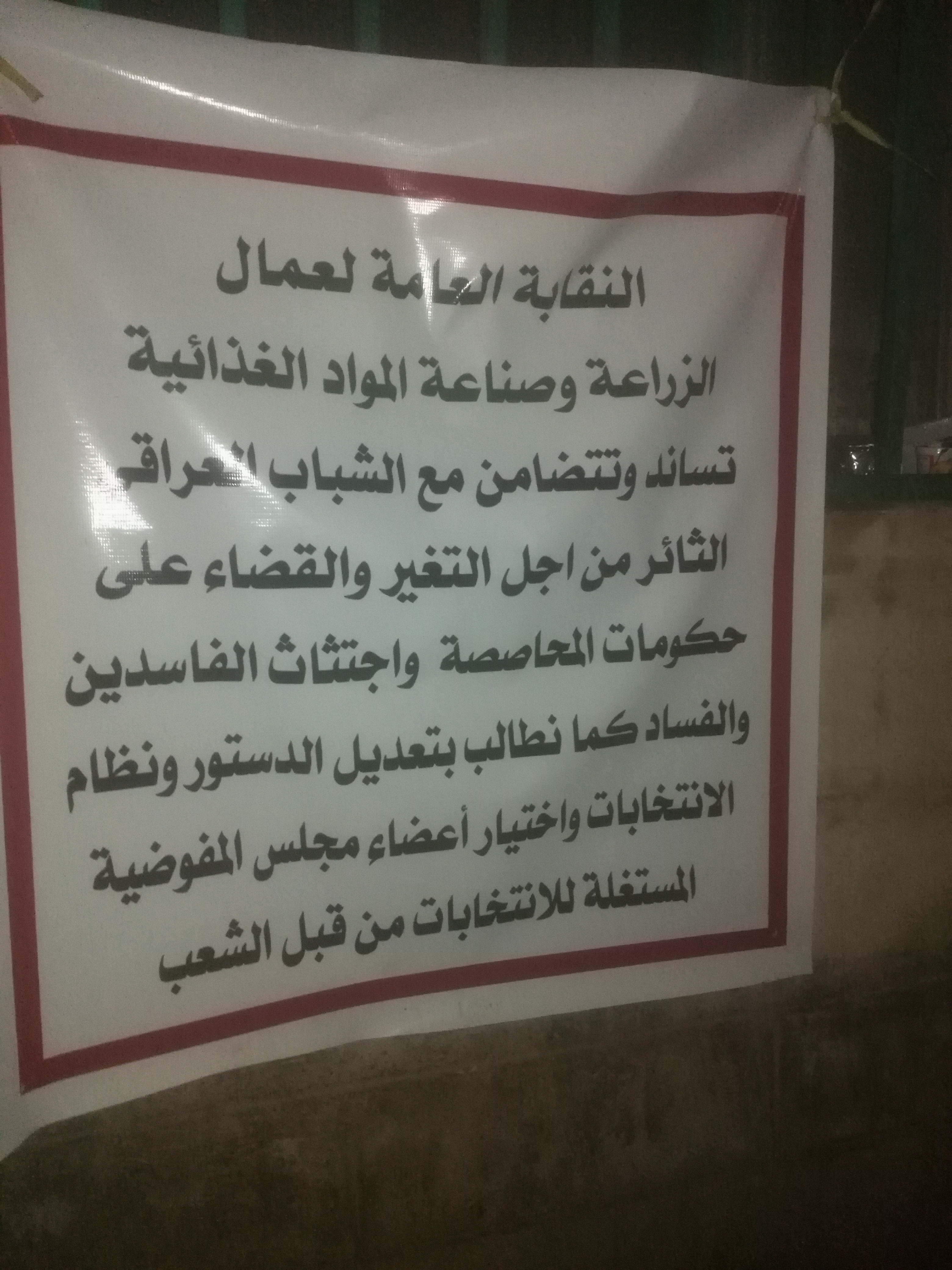 النقابة العامة لعمال الزراعة وصناعة المواد الغذائية تتضامن مع الثورة